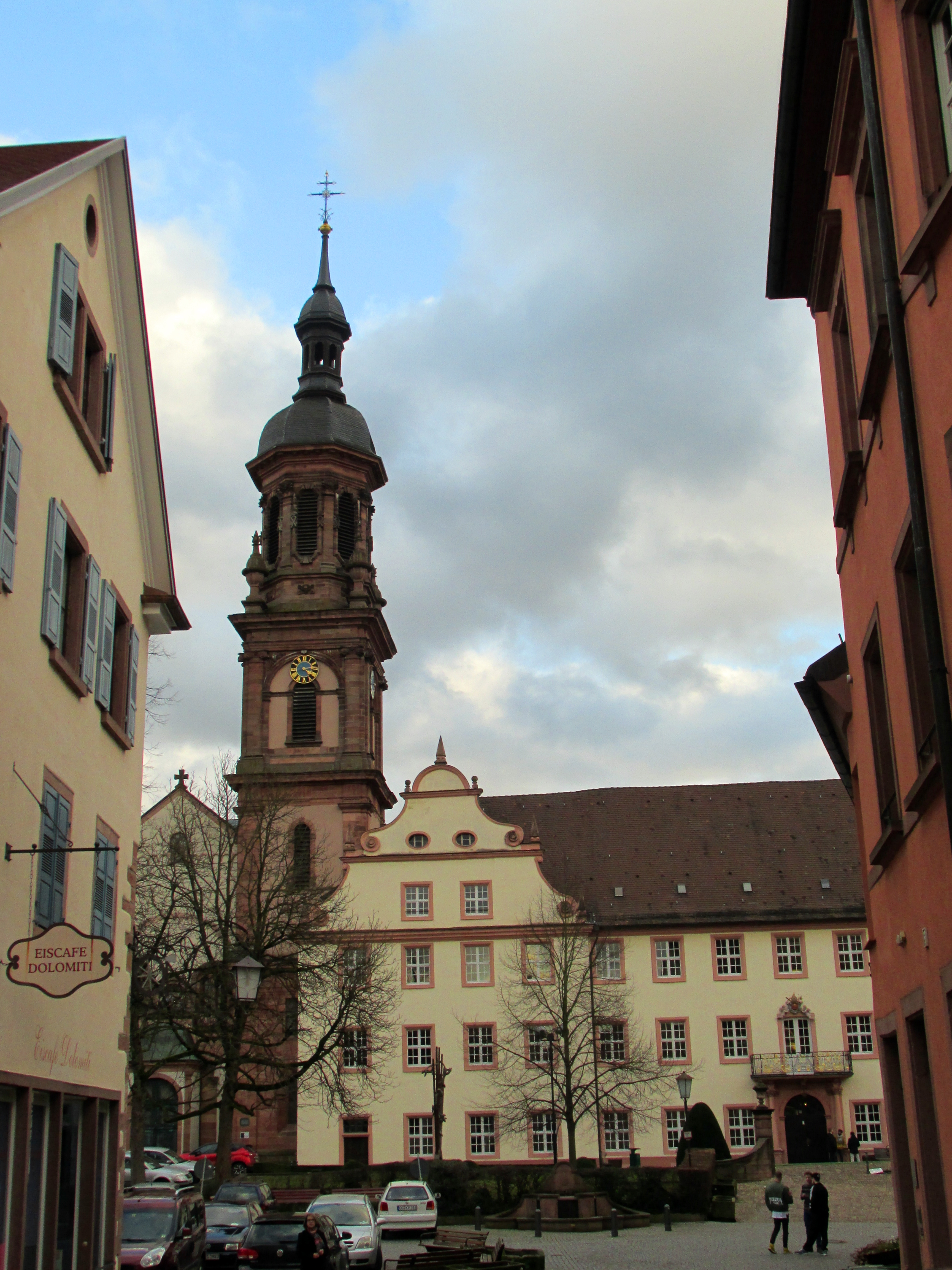 Stadtkirche Sankt Marien Gengenbach